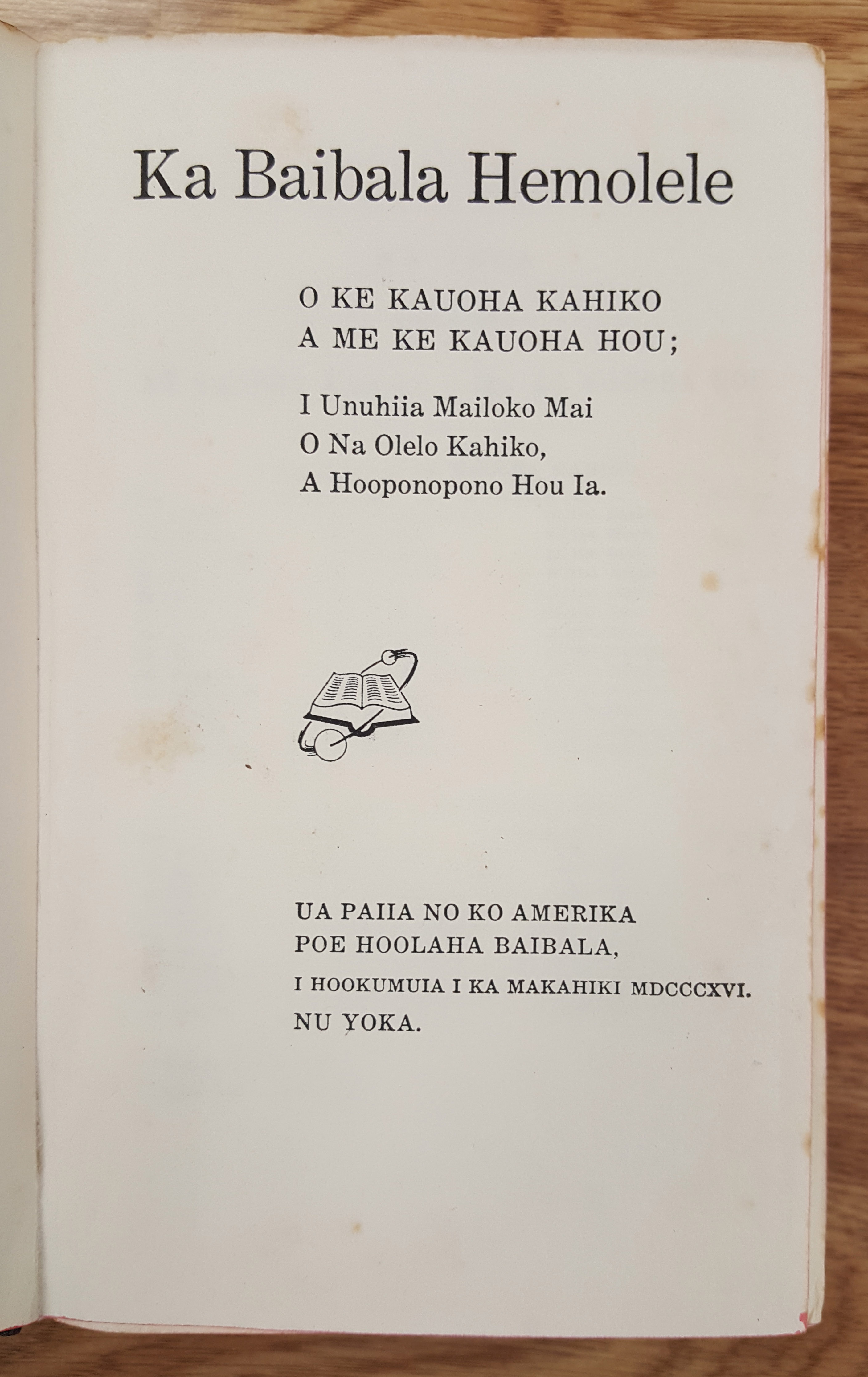 The Hawaiian language Bible inside cover, a reprint in the 1960s